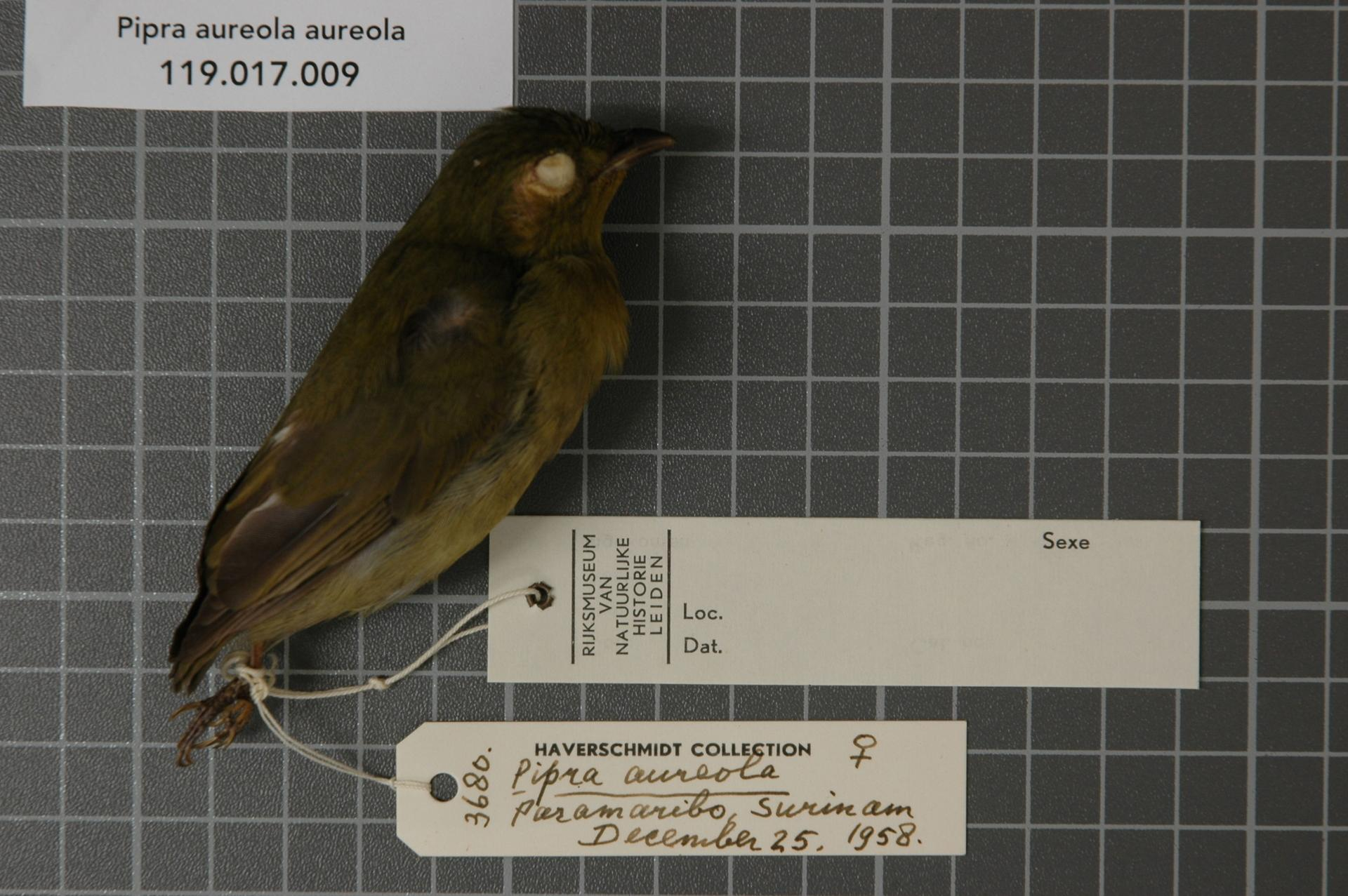 Pipra aureola aureola (Linnaeus, 1758)